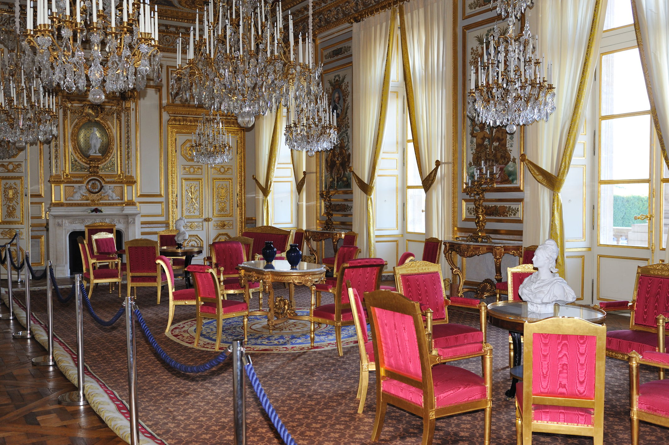 Hôtel de la Marine, place de la Concorde, Paris, France : salon d'honneur Photo prise à l'occasion des journées européennes du patrimoine 2010